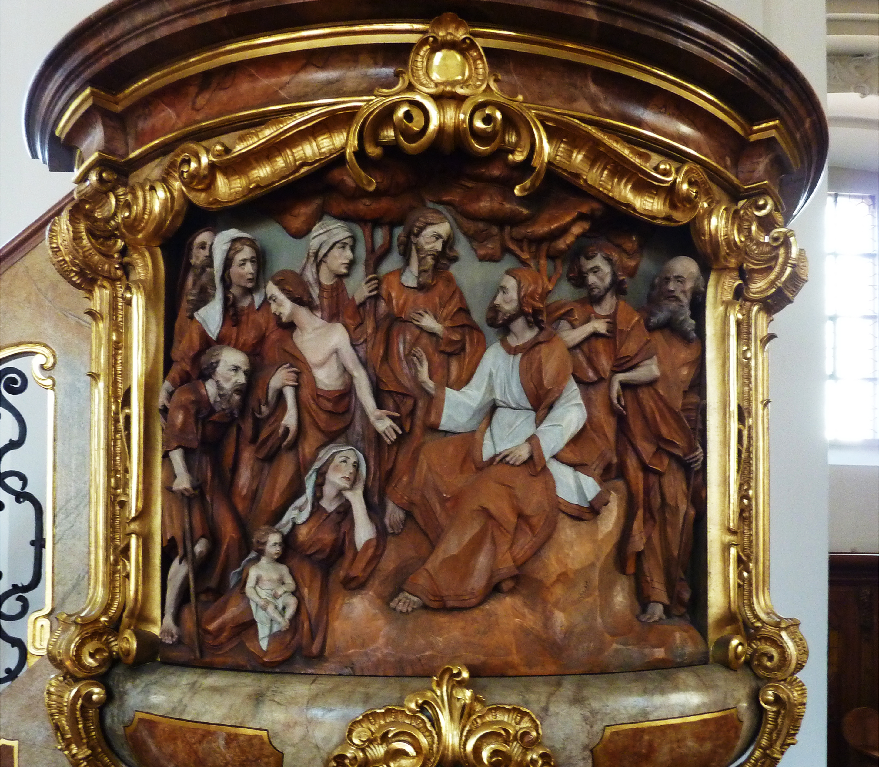 St. Josef, Kollnau - Flachrelief am Kanzelkorb: Bergpredigt. Von der Firma Marmon, Sigmaringen gefertigt.